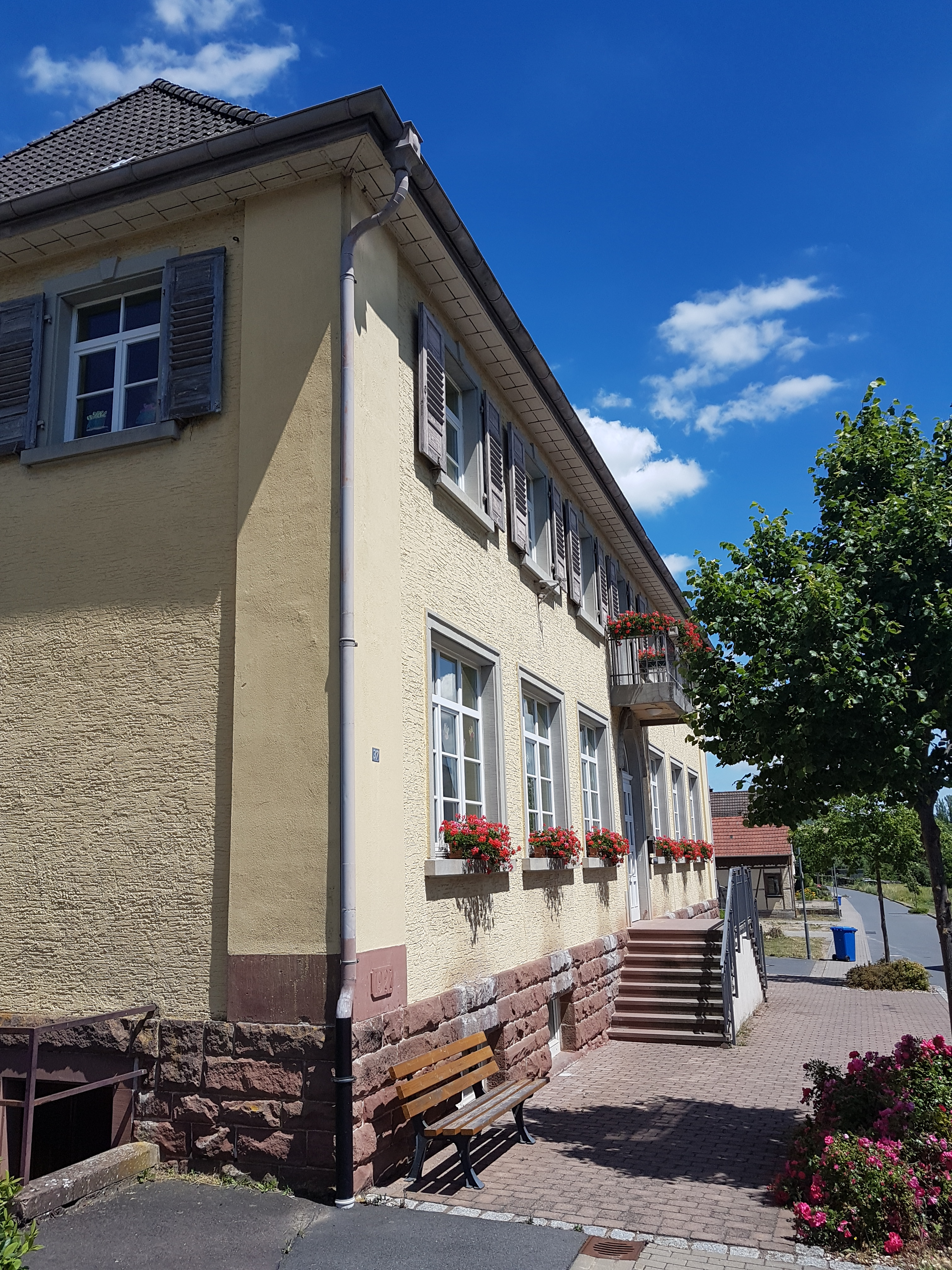 Grundschule Oberlauda, Außenstelle der Gemeinschaftsschule, Grund- und Werkrealschule Lauda Außenstelle Grundschule Oberlauda Schulstraße 37, 97922 Lauda-Königshofen